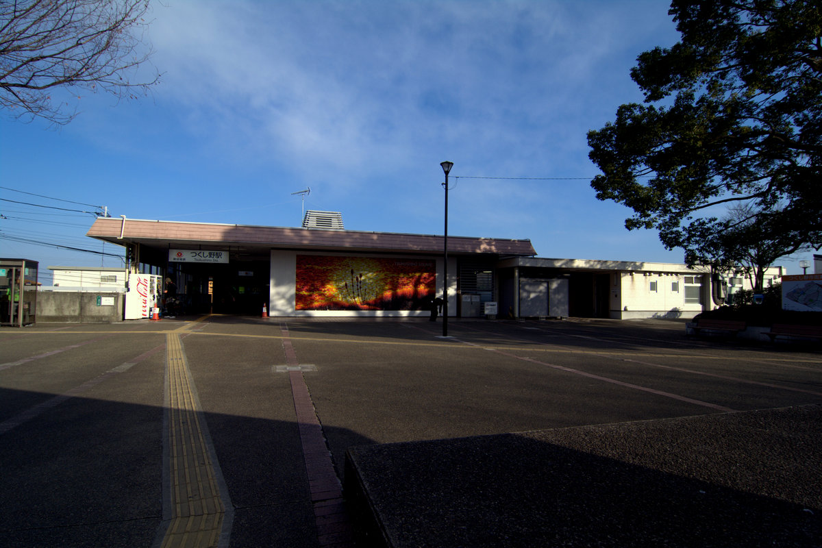 東京急行電鉄株式会社田園都市線つくし野駅